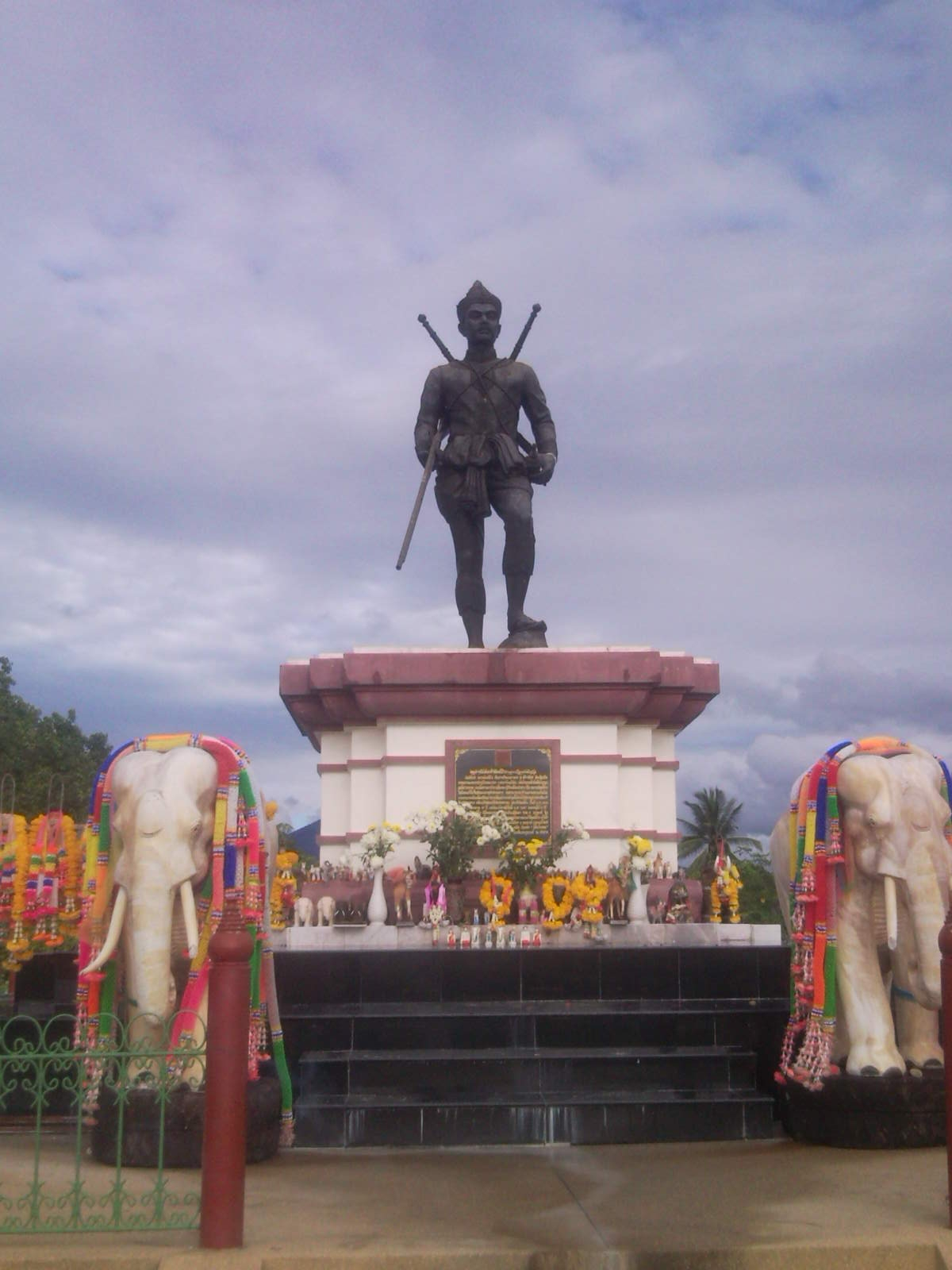 รูปเจ้าพ่อทิพย์ช้าง